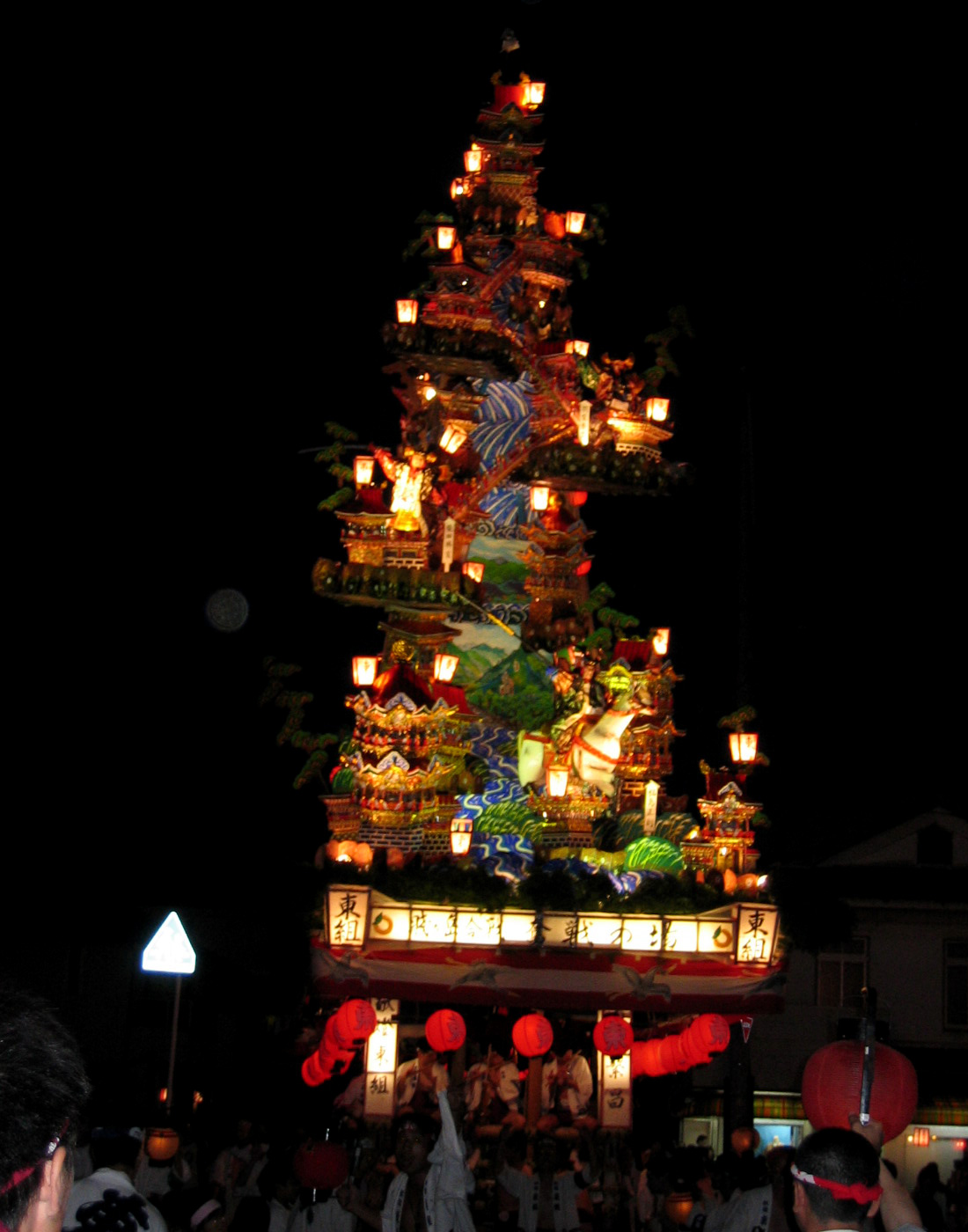 Hamasaki Gion Yamakasa(浜崎祇園山笠), saga, Japan.